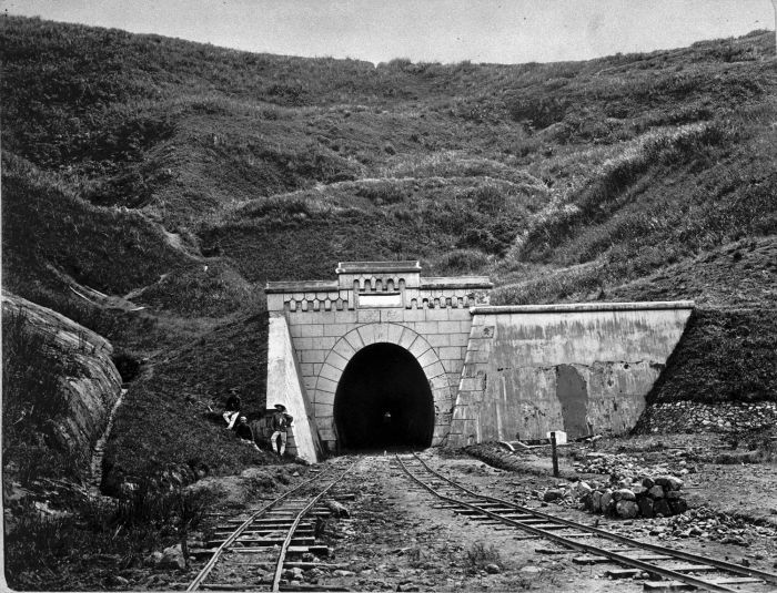 Foto. Spoorwegtunnel in de omgeving van Soekaboemi.